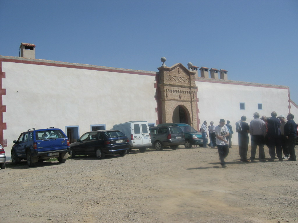 Iglesia de Nuestra Señora de la Virgen del Águila